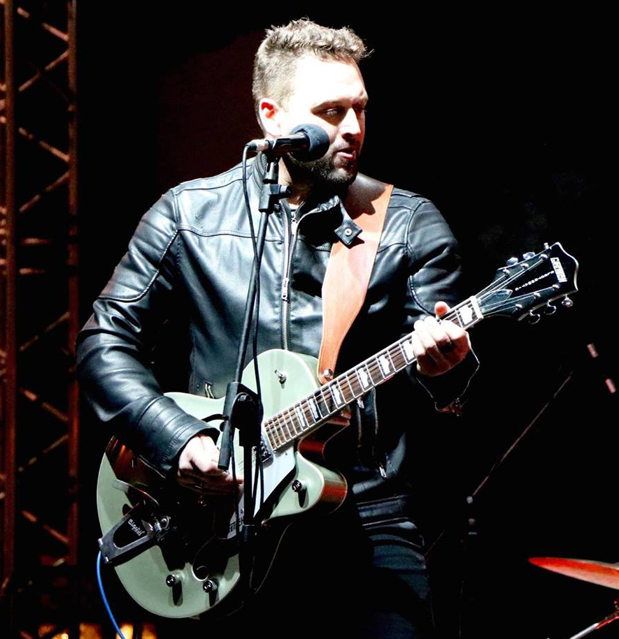 Arpetan: Philippe Milleret, chantor vâldoten de lengoua arpetana.